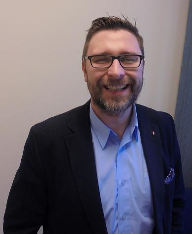 Tomasz Kruszewski